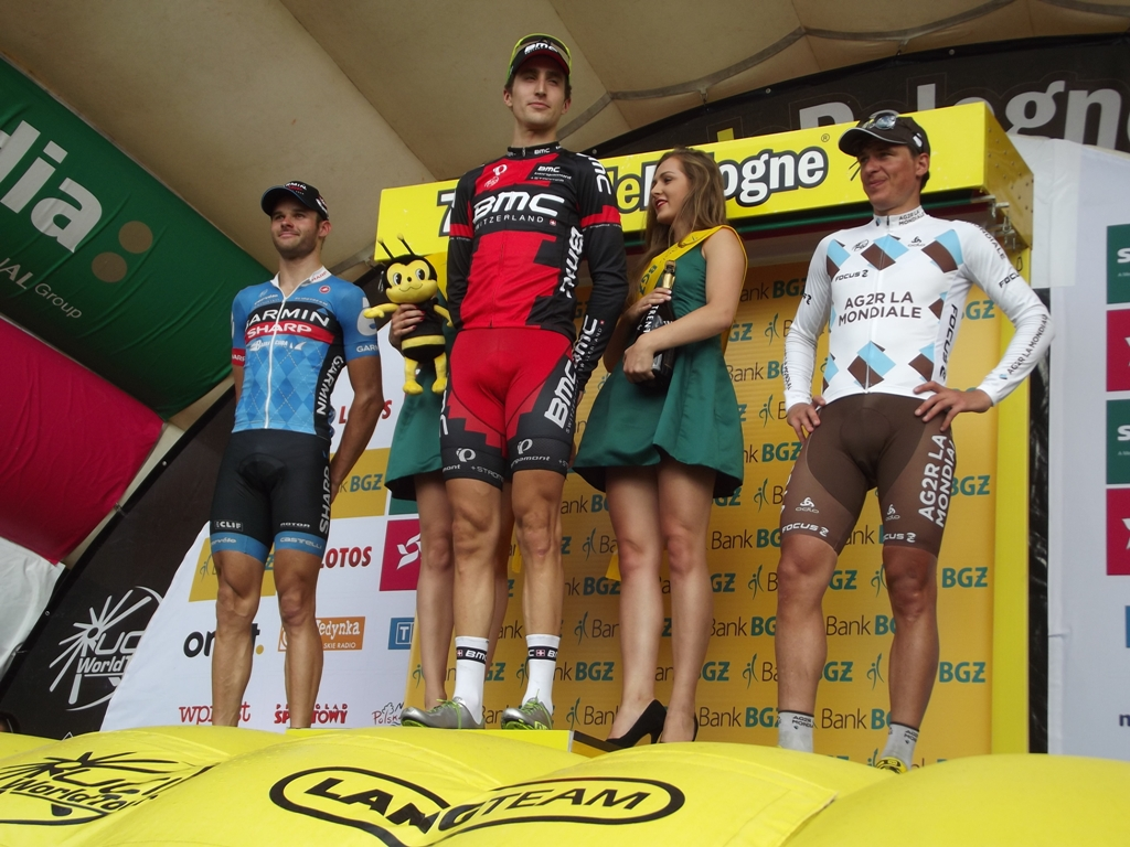 Zdjęcie zrobione podczas IV etapu 70. jubileuszowego Tour de Pologne w Katowicach.